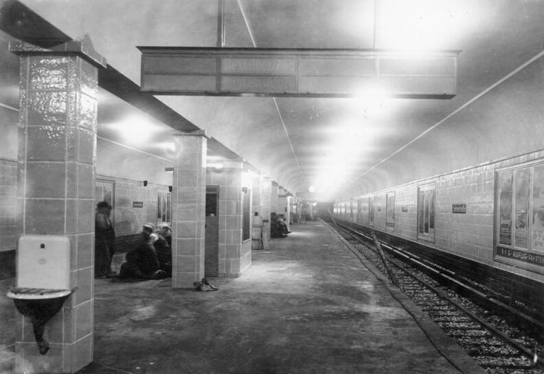 ADN-ZB/Archiv Berlin 1929 UBz den Bau des Untergrund-Bahnhofes Leinestraße in Berlin-Neukölln kurz vor der Fertigstellung. 25523-29 [Scherl Bilderdienst]